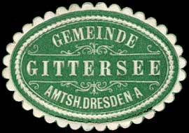 Sealing stamp Title: Gemeinde Gittersee - Amtsh. Dresden-Altstadt Description: grün, weiß, geprägt Place: Gittersee size: 3x4 cm